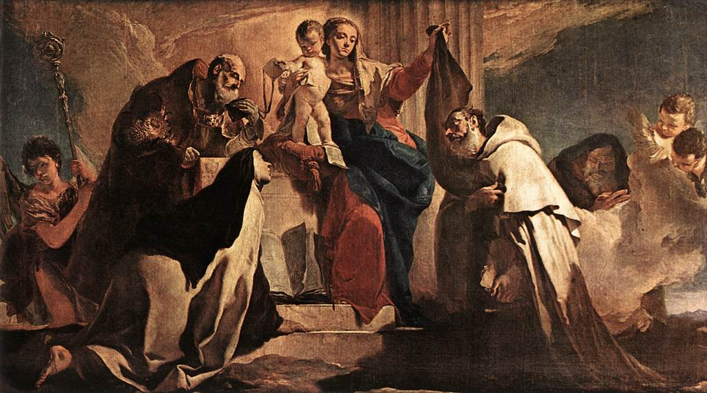 (detail)